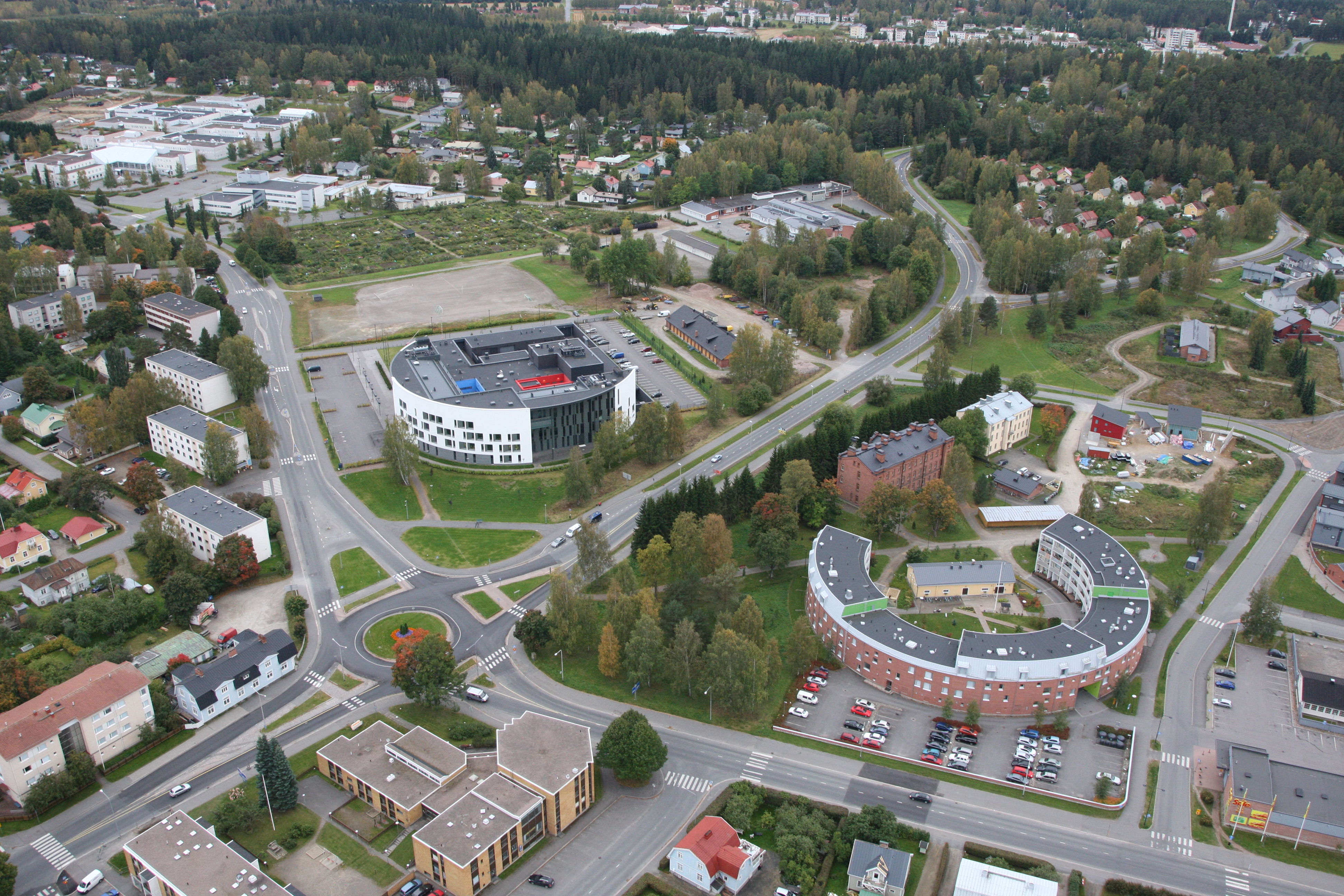 Poltinaho HML ja poliisitalo